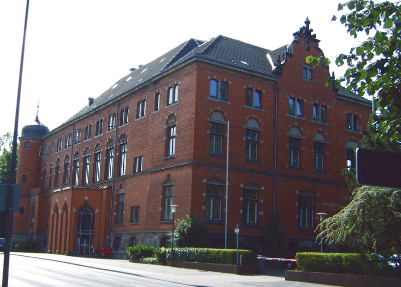 Elisabeth-Anna-Palais in Oldenburg, Straßenseite.